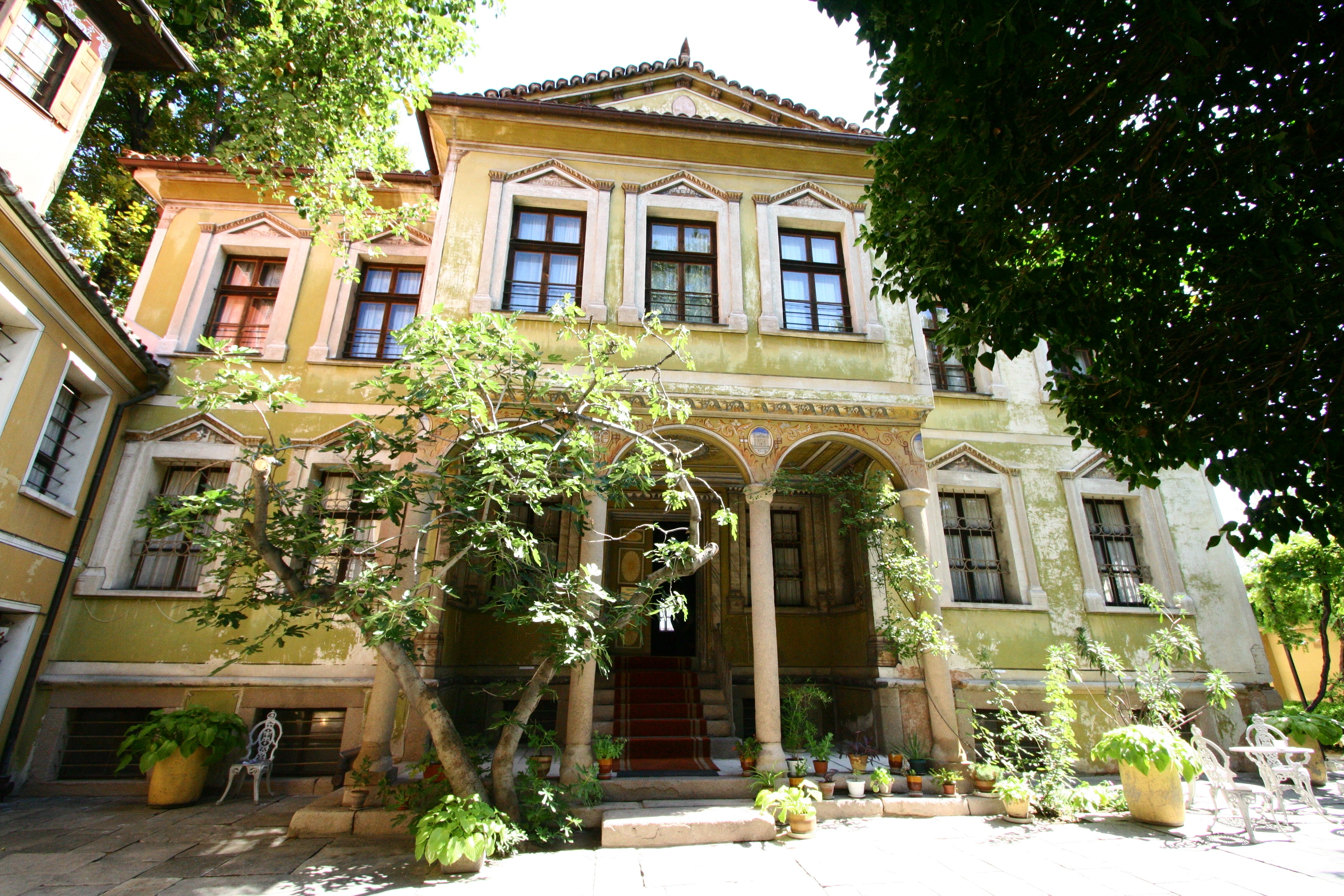 Casa Nedkovich - 1